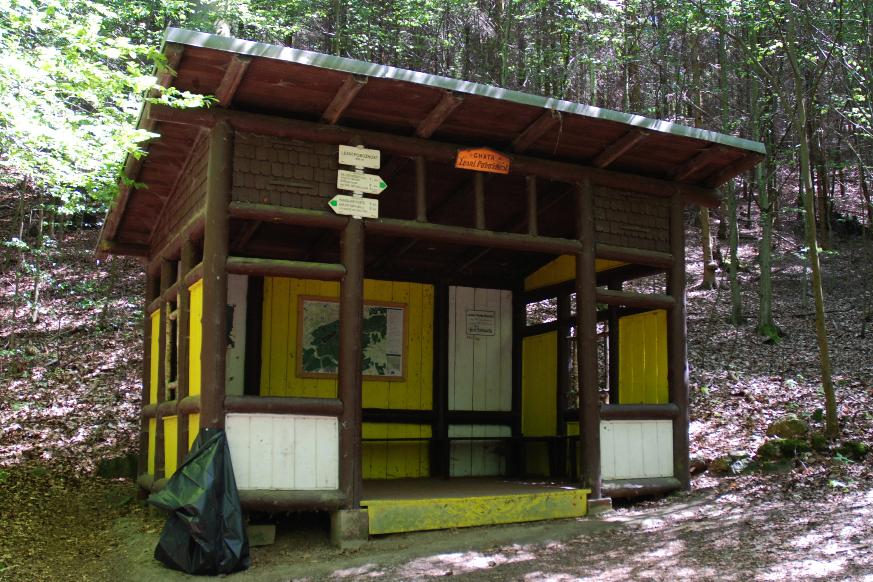 Chata Lesní pobožnost v karlovarských lázeňských lesích u Russelovy cesty